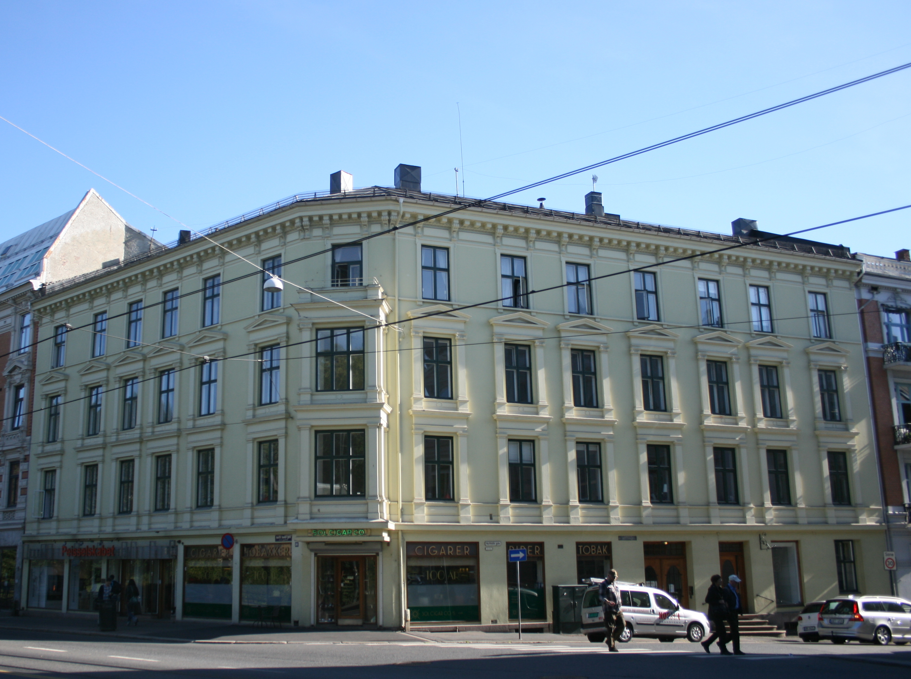 Henrik Ibsens gate 28 - Oslo. Bygård fra 1870-åra. Ark. August Tidemand. Opprinnelig Huitfeldts gate 2, senere Drammensveien 8. Sol Cigarforretning siden 1911.